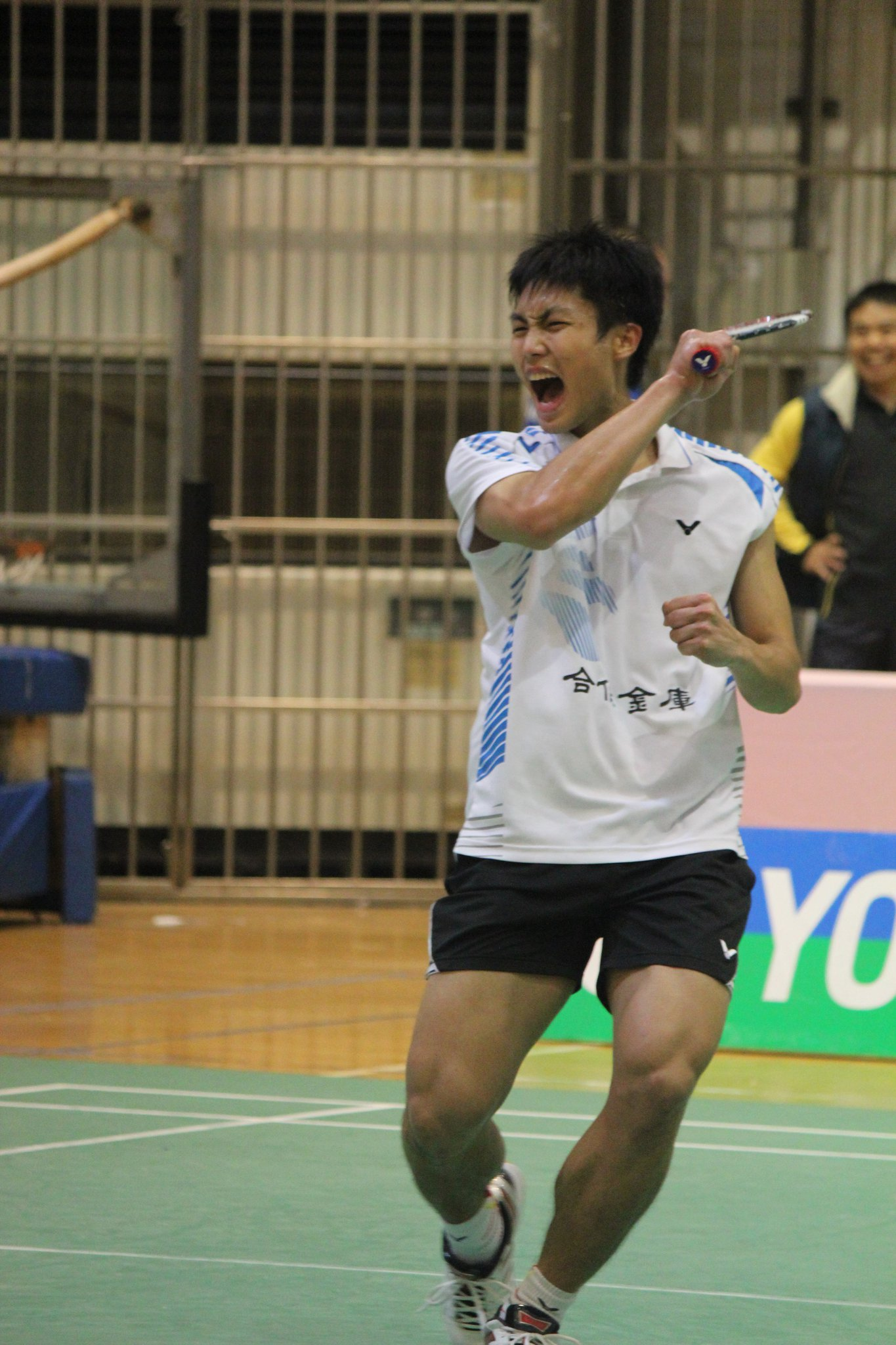 2010/12/20全國總排名賽(台中豐原)